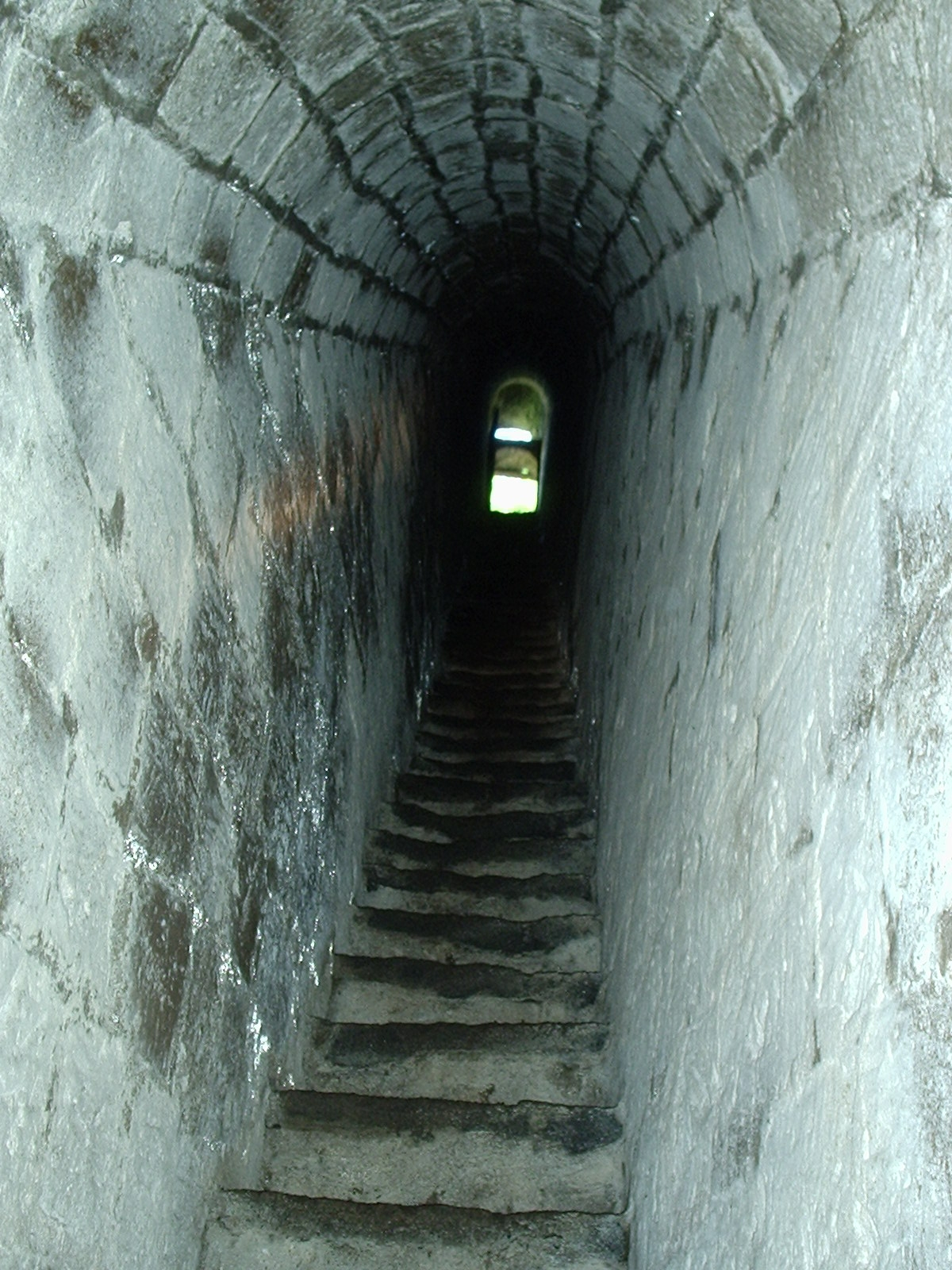 accesso all'acquedotto di epoca romana, che alimenta il fonte Helvius, collocato in piazza G.B. Ferrajoli di Sant'Egidio del Monte Albino (Salerno)